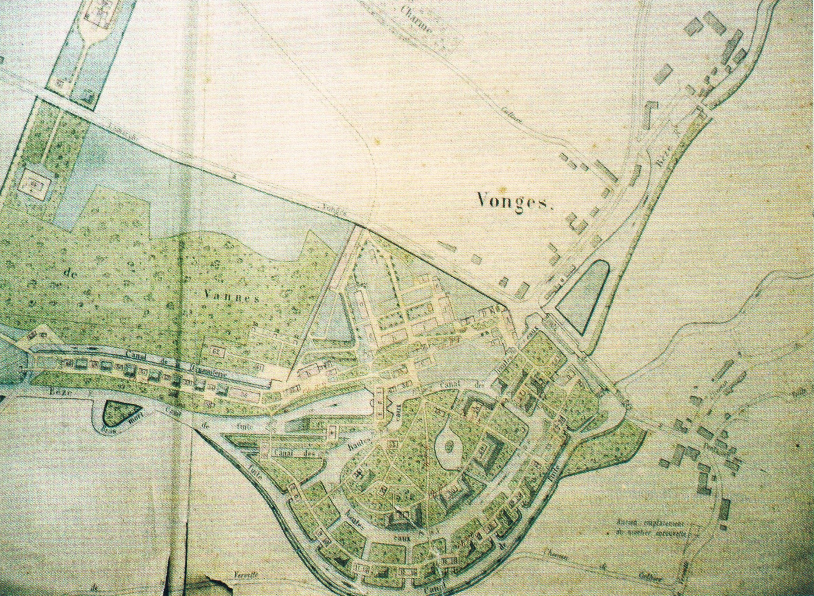 Plan de la poudrerie de Vonges en 1884 et montrant le réseau de canaux lié à la Bèze. Carte réalisée le 03/11/1884 (auteur inconnu).